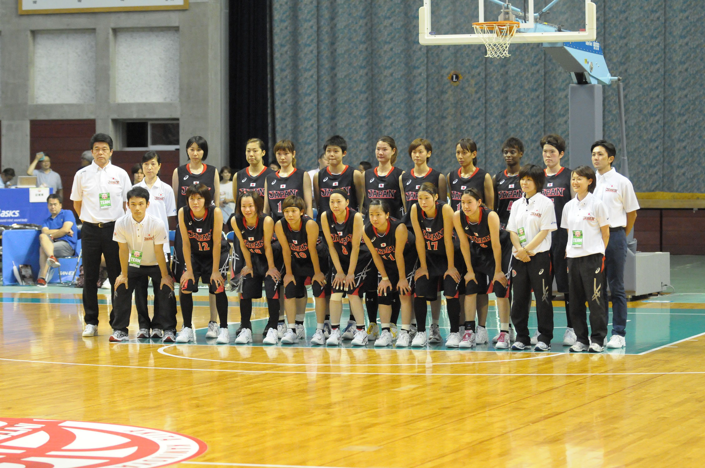 バスケットボール女子日本代表チーム（アジア競技大会出場）。秋田市立体育館で。